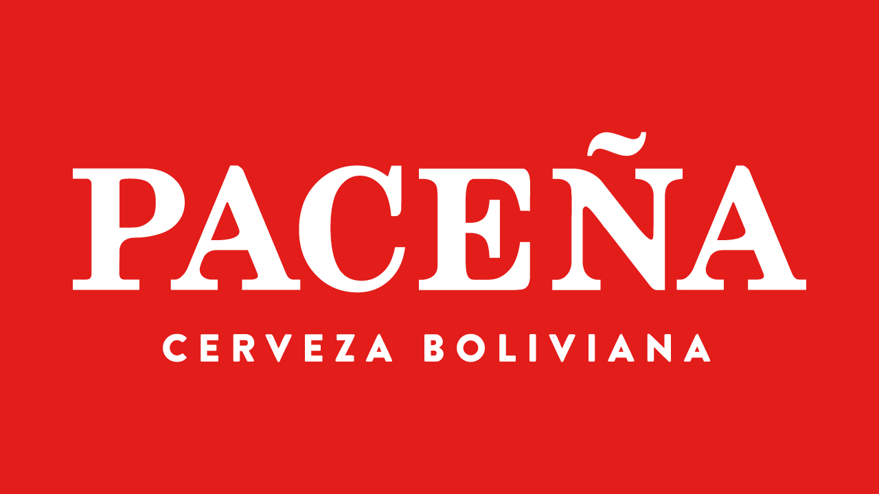 Cerveza Paceña logo